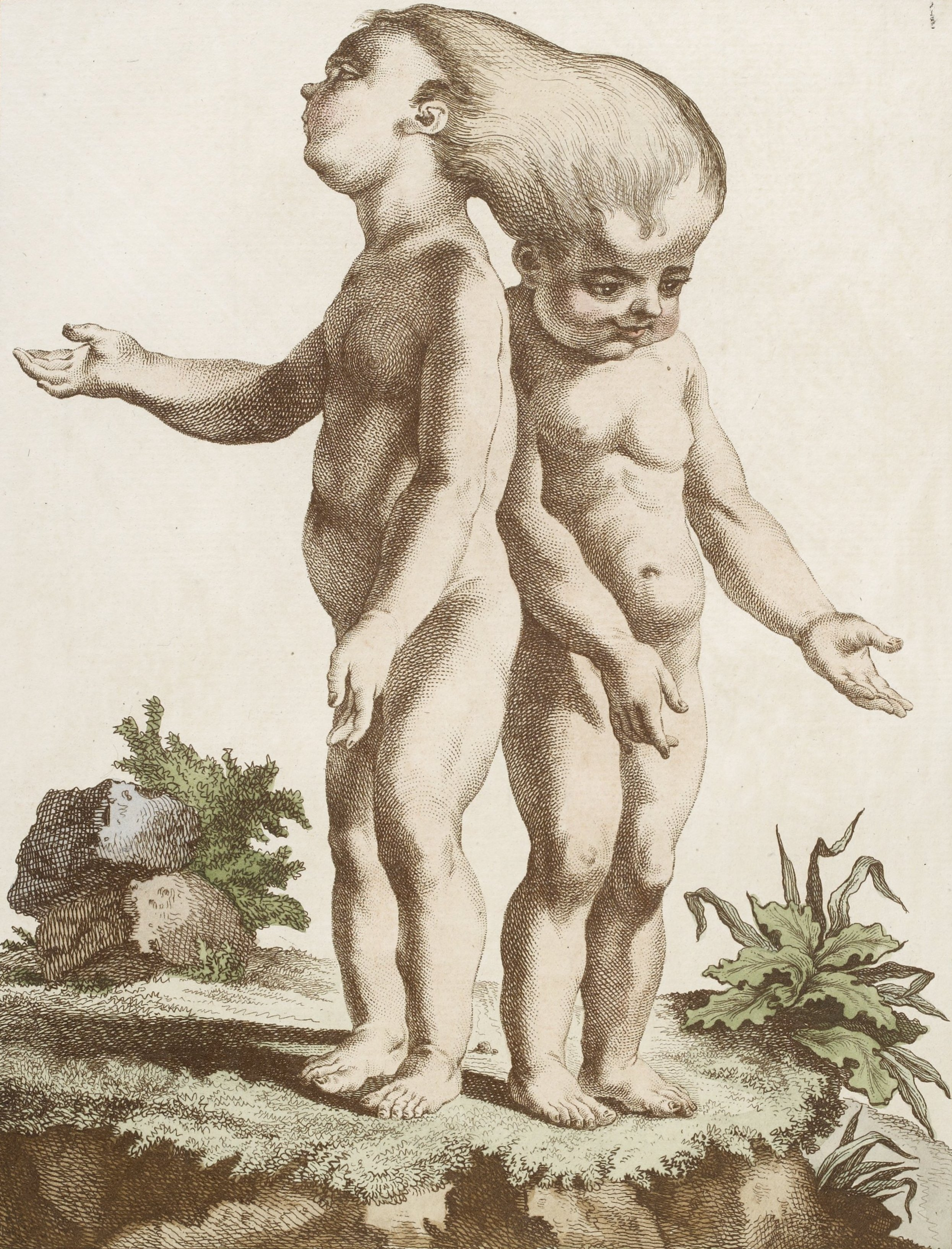 Bild aus Les écarts de la nature